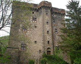 Chateau de La Boyle, Cantal, France